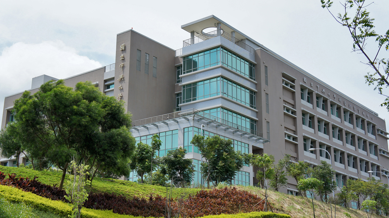 中文（台灣）: 國立中興大學研發創業育成中心。